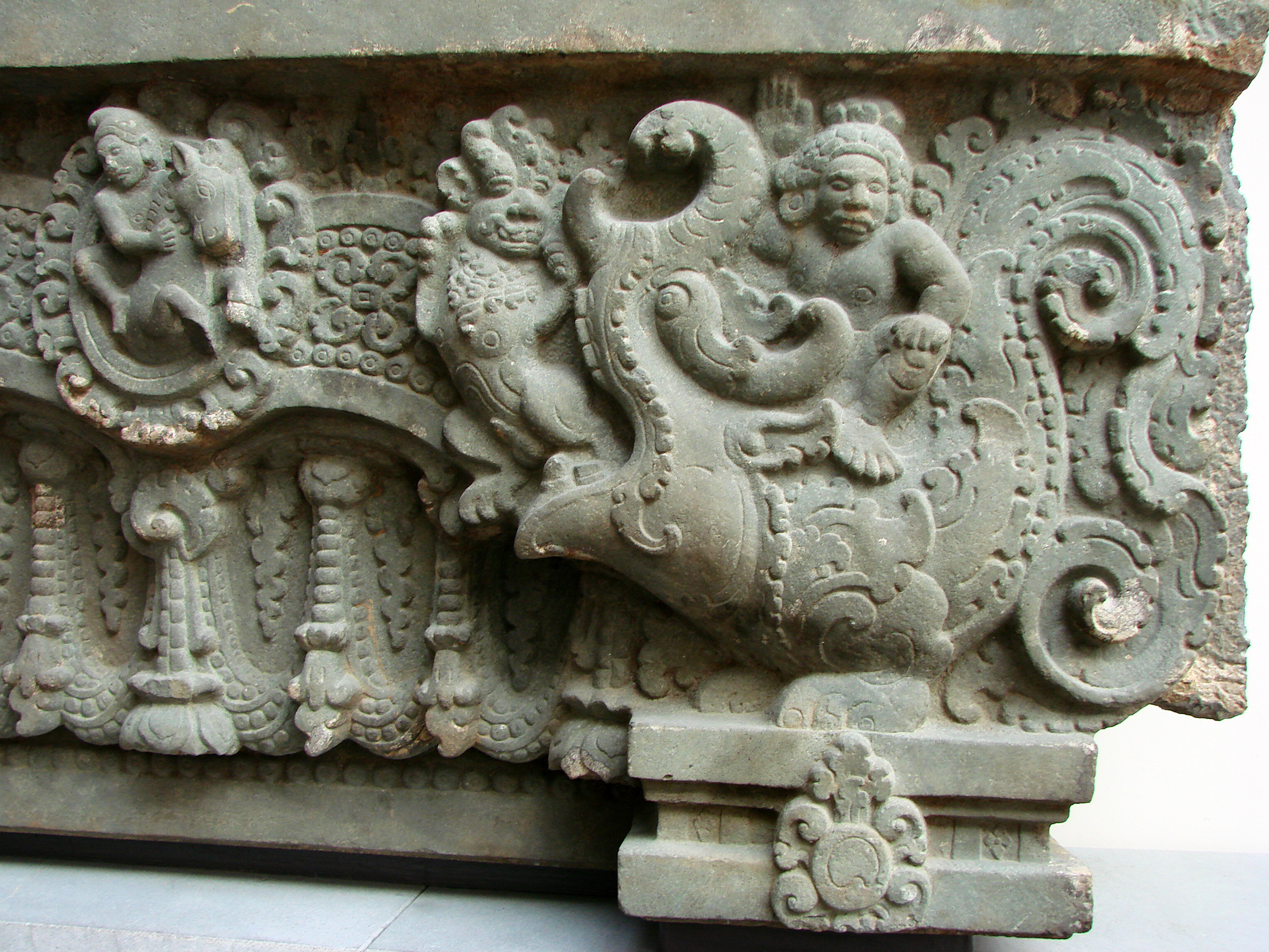 Linteau. Provenance: Cambodge, province de Kompong Thom, Sambor Prei Kuk S7. Style de Sambor Prei Kuk. 1ère moitié du 7ème siècle.Détail montrant le bord du linteau et un Marut, dieu de la tempête et du vent. Musée Guimet, Paris.